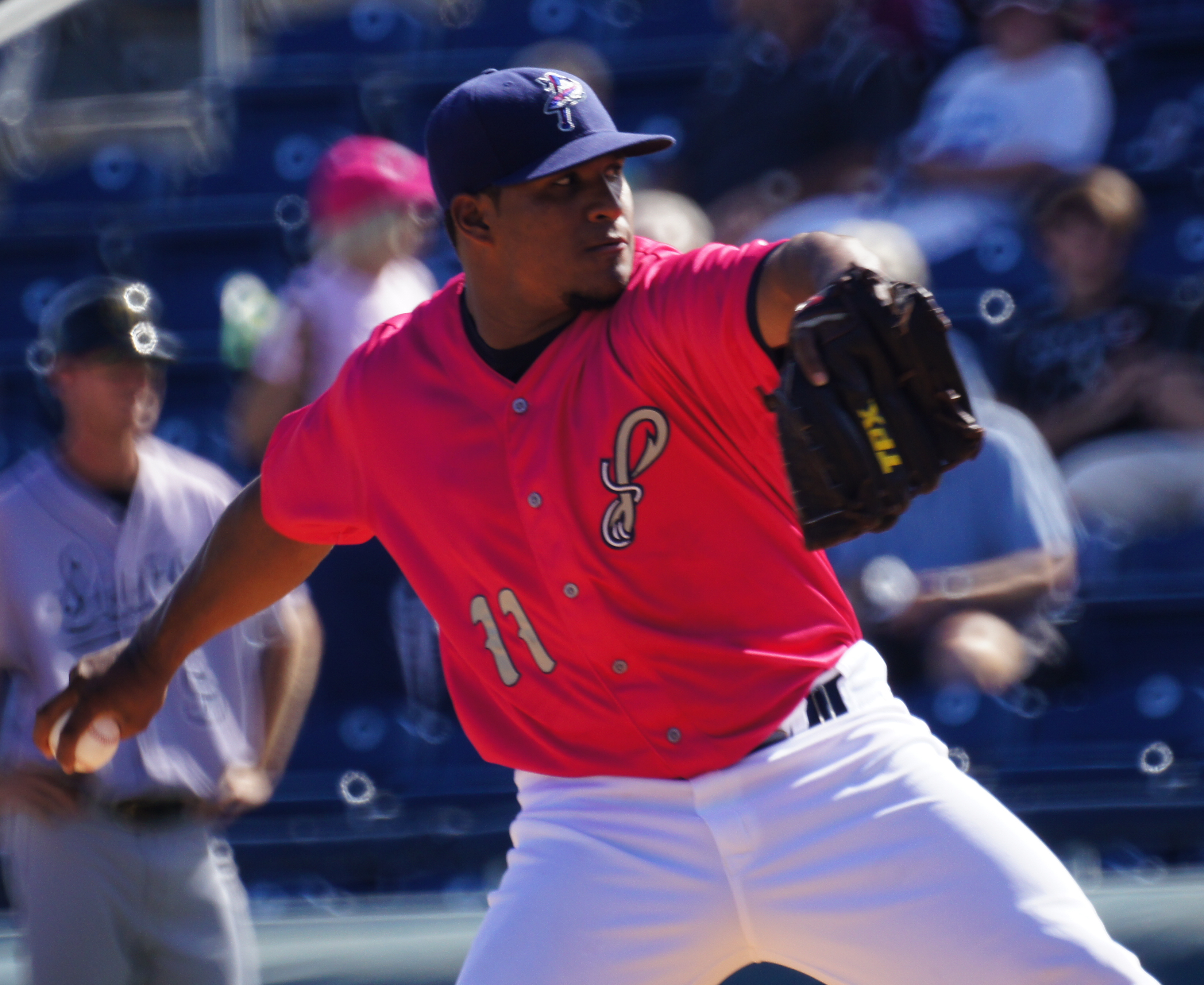 Carlos Contreras